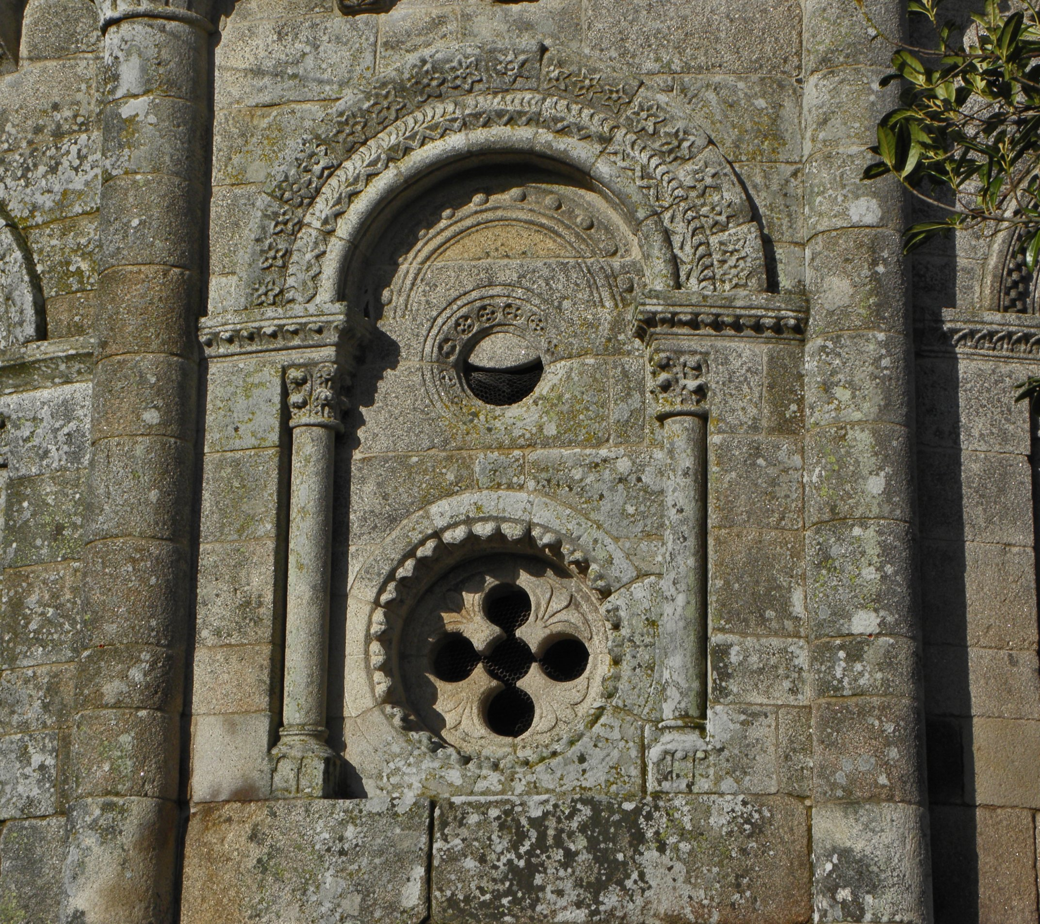 Igrexa de San Pedro de Vilanova, Dozón